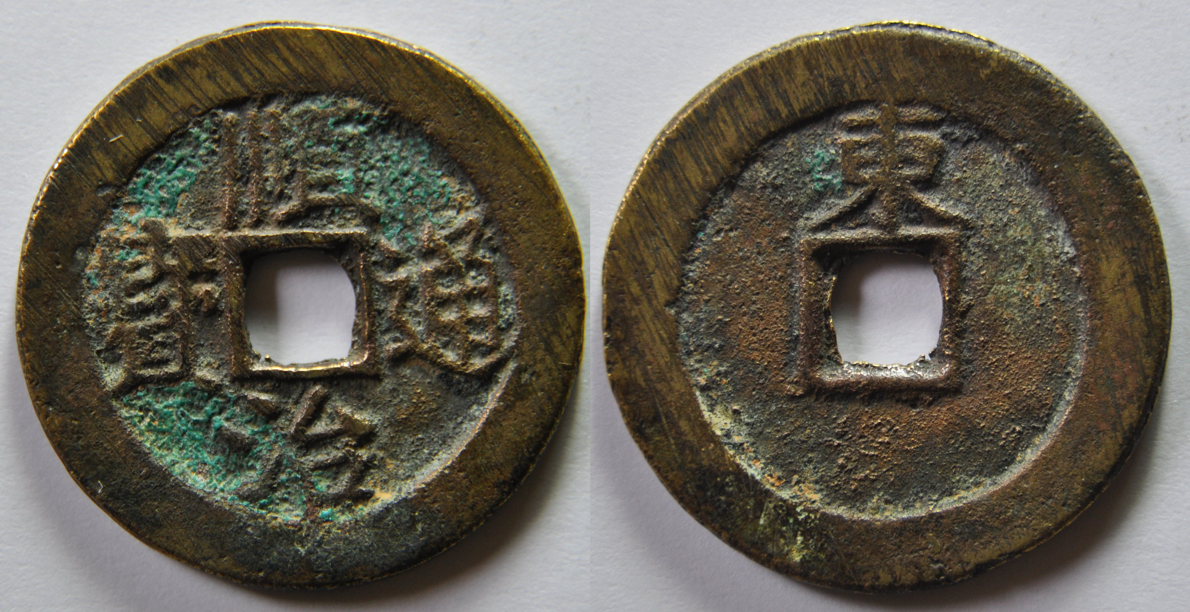 Une monnaie en laton d'une sapèque (1 cash) de l'empereur Shi Zu (1644-1661), ère Shun Zhi de la dynastie Qing (1644-1912). Ces dates désignent en fait la période pendant laquelle cette dynastie a régné sur la Chine mais elle a été fondée en 1636 par le khan Abahai (1627-1643) dans l'objectif d'envahir la Chine. La monnaie se lit en lecture en croix. A/ Shun Zhi tong bao (Monnaie courante de Shun Zhi) R/ Dong en haut (en caractère chinois pour l'atelier de Jinan au Shandong) Dimension : 25,88 mm Poids : 4,4 g. Remarque : La province du Shandong est prise en 1644 par les Mandchous. En 1644, les monnaies au nom de l'empereur sont fabriquées à un poids de 1 qian (environ 3,7 g.) dans seulement deux ateliers mais sans marque d'atelier. En 1645, le poids passe à 1,2 qian (environ 4,4 g.) avec marque d'atelier par un caractère chinois au revers à droite. En 1651, le poids passe à 1,25 qian (ca 4,6 g.) toujours avec un caractère chinois au revers mais en haut. En 1653, les caractères yi li indiquant l'équivalent de 1/1000 de liang d'argent est rajouté au revers et des mesures sont prises pour garantir la qualité de la monnaie et empêcher le faux monnayage. Comme ceci échoue, en 1657, on enlève la mention de yi li au revers, le poids est augmenté à 1,4 qian (ca 5,2 g.) et le nom de l'atelier est rajouté en mandchou au revers. Référence : H22.34 Indice de rareté : 14, très commune d'après D.Hartill.